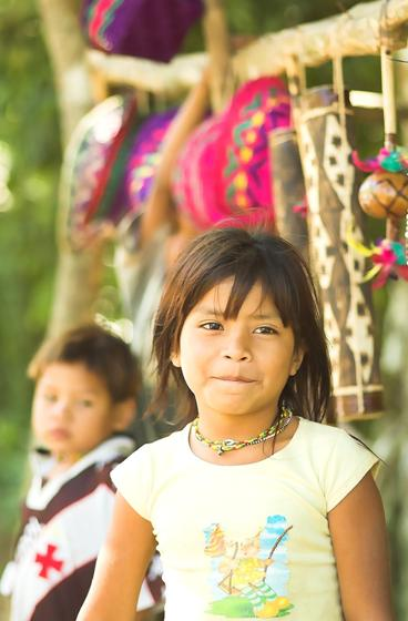 Mbya Guarani girl